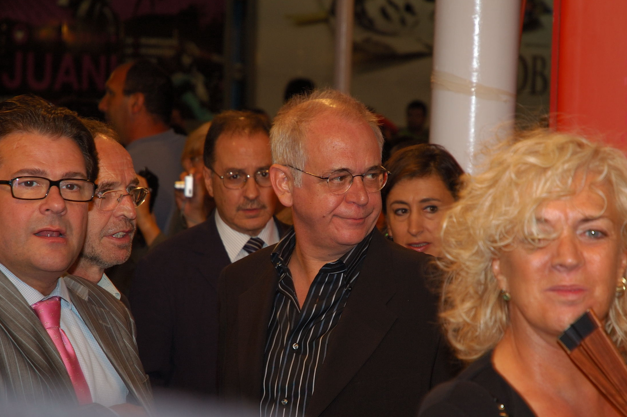 El crítico y director de cine español Diego Galán en el Festival Internacional de Cine de San Sebastián de 2006.